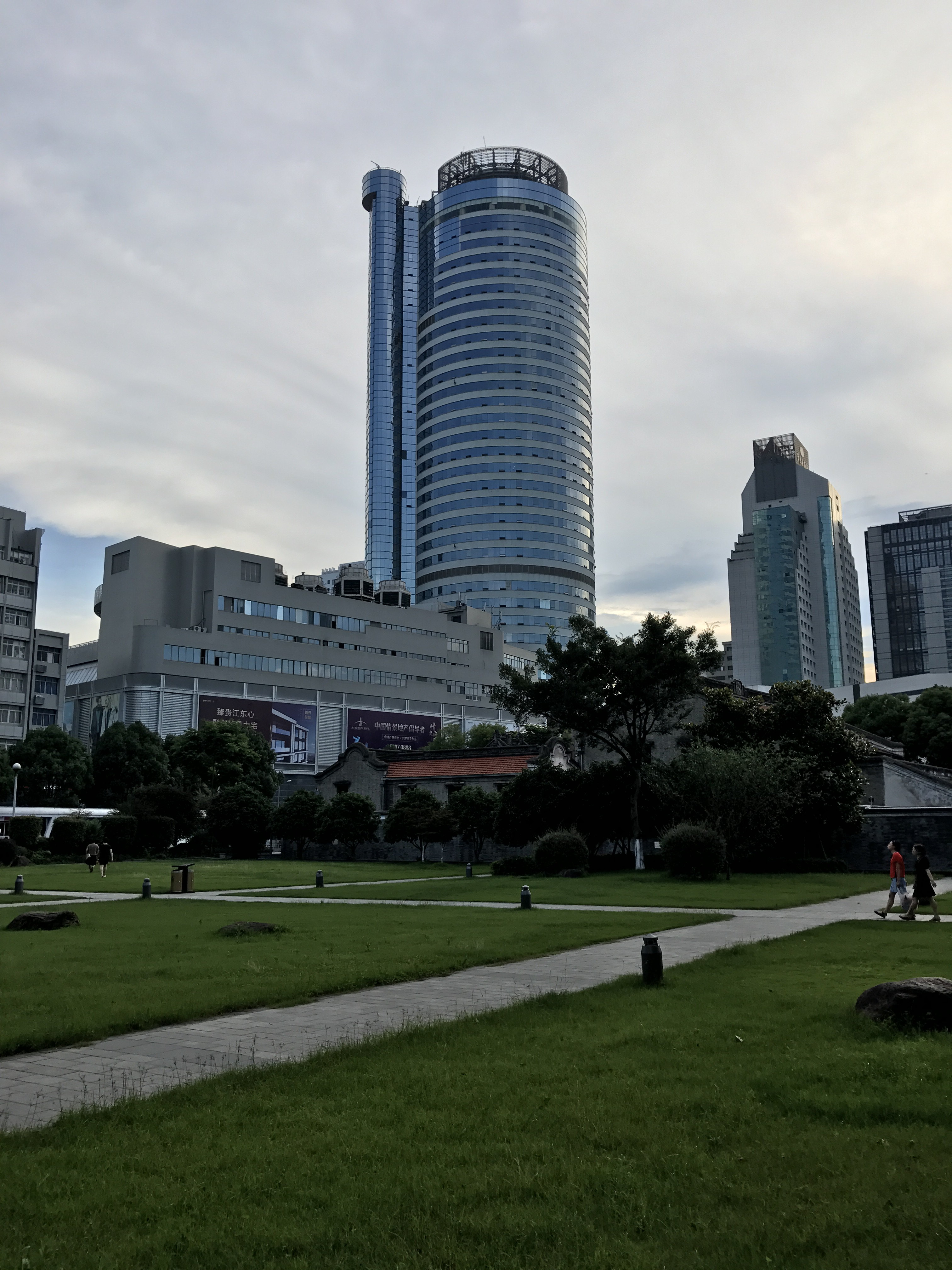 从钱业会馆方向拍摄的中农信国际商厦